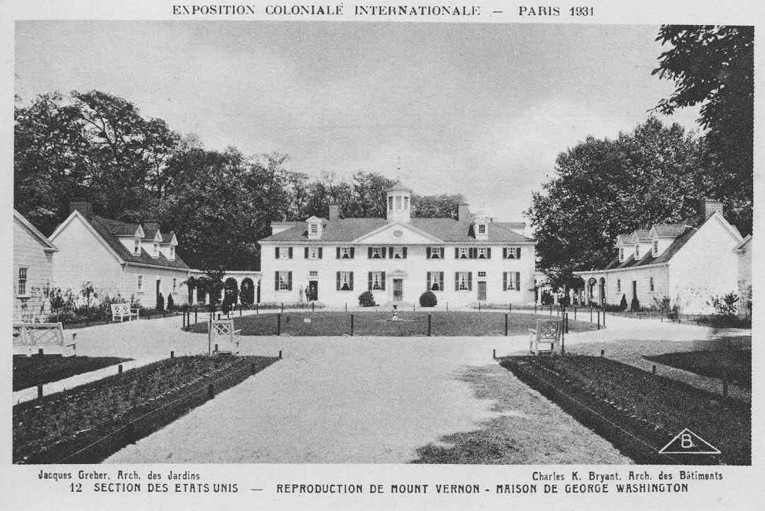 Pavillon des USA à l'Exposition Coloniale de PARIS en 1931